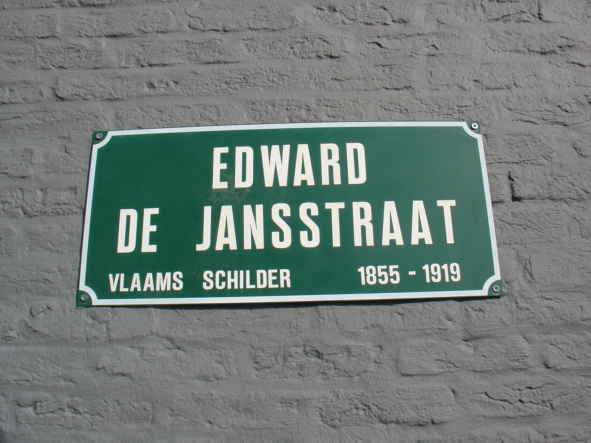 Straatnamenbord Edward de Jansstraat